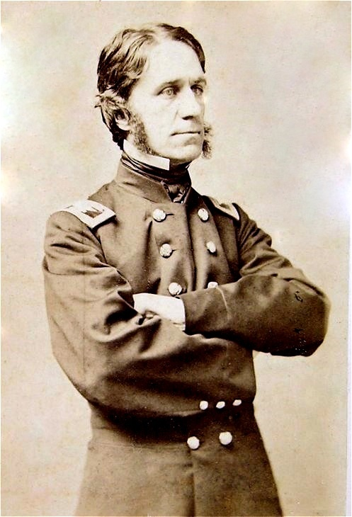 Carte de Visite of Eben Francis Stone